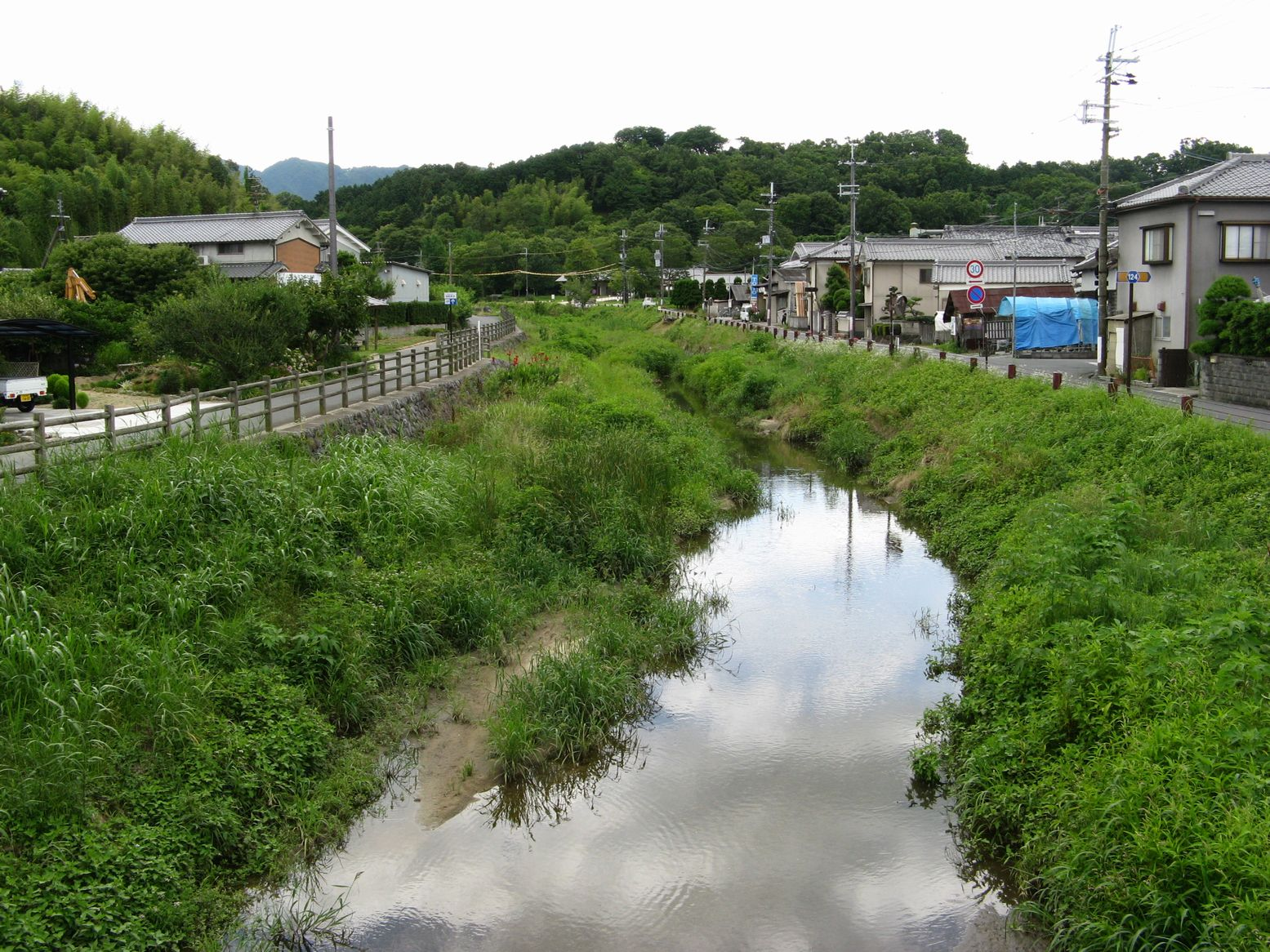 飛鳥川 (奈良県) 雷橋から南望 正面奥は甘樫丘